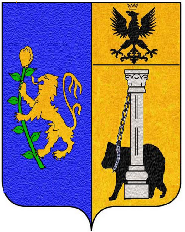 stema del duca sforza cesarini